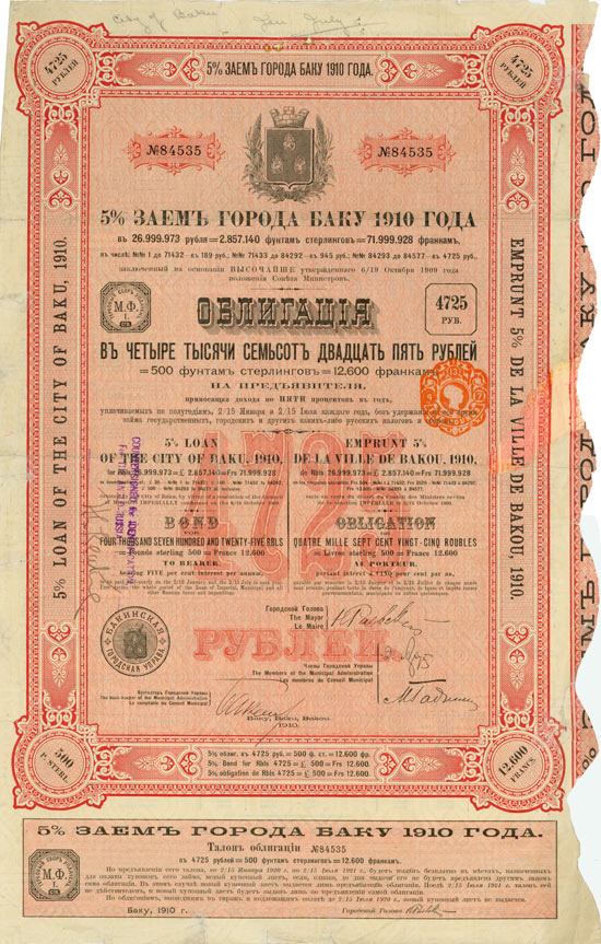 Наименование: City of Baku / Ville de Bakou Наименование (Русский): Заем г. Баку Страна: Russland, Aserbaidschan Описание: Baku, 1910, 5 % Obligation über 4.725 Rubel = £ 500 = 12.600 Francs, #84535, 44,4 x 28,5 cm, rot, schwarz, britischer Steuerstempel, Knickfalte quer, Randeinrisse und Fehlstück professionell restauriert, Drumm/Henseler SUT 2005c, R10. Auflage nur 285 Stück! Absolute Rarität! Описание (Русский): Баку, 1910, 5 % облигация в 4.725 руб. = £ 500 = 12.600 франков, №84535, 44,4 x 28,5 см, красный, черный, британская печать гербового сбора, складка поперек, разрывы по краям и оторванный фрагмент профессионально отреставрированы, № в каталоге Друмм/Хензелер SUT 2005c, R10. Выпуск состоял всего из 285 облигаций! Абсолютная редкость!